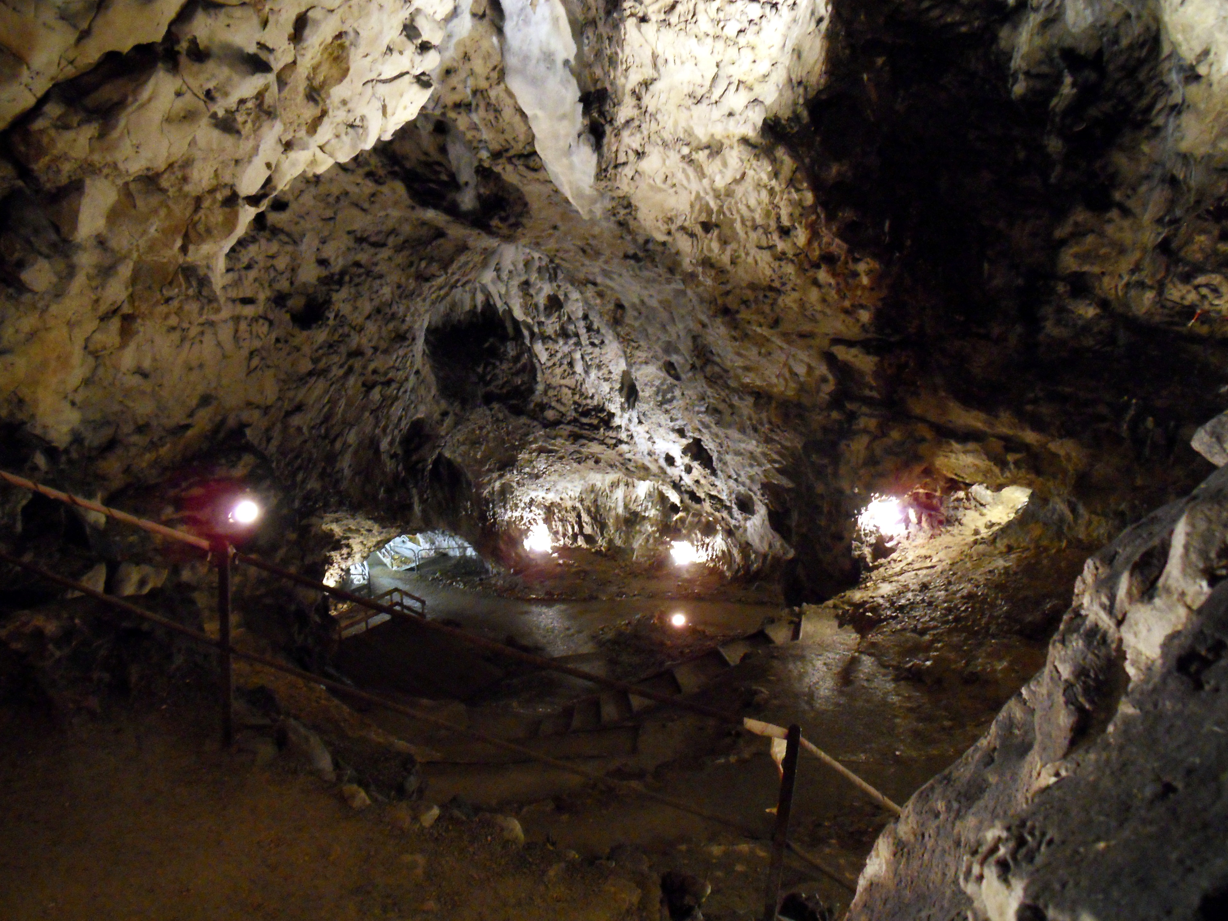 Halle der Hoehle "Hohler Fels" im Achtal bei Schelklingen, Schwaebische Alb, Sueddeutschland. Aufnahme vom hoechsten begehbaren Punkt aus nach unten, von Sueden nach Norden. Im linken unteren Quadranten ist die Buehne für die Hoehlenkonzerte sowie der zum Hoehlenausgang fuehrende Gang mit dem ueber die Grabungsstaette fuehrenden Steg zu erkennen.